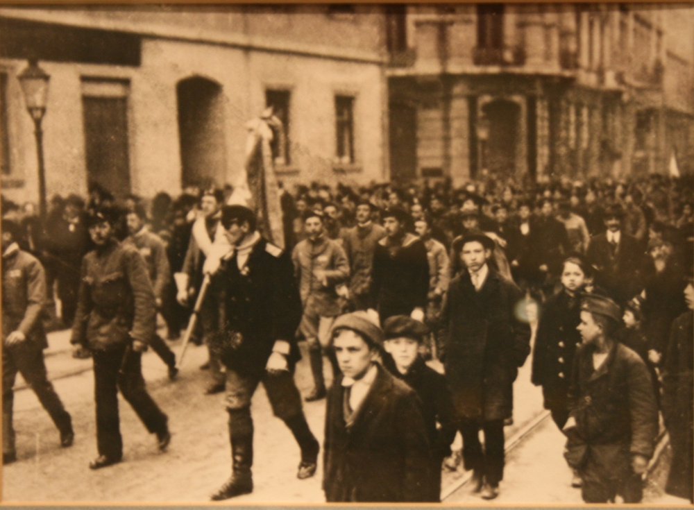 Fotografija prosvjeda u Zagrebu 5. prosinca 1918. u Muzeju grada Zagreba